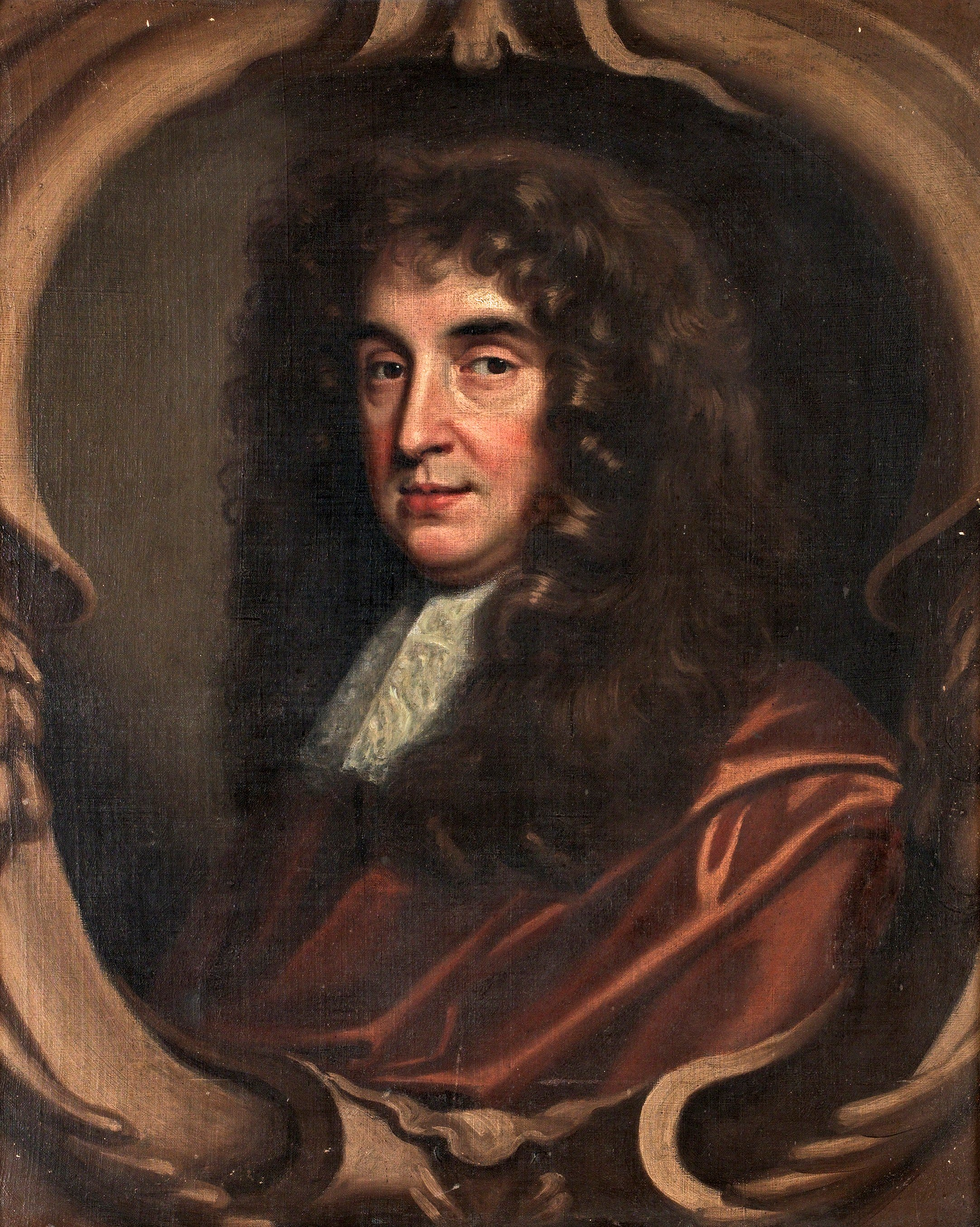 Lord Bolton